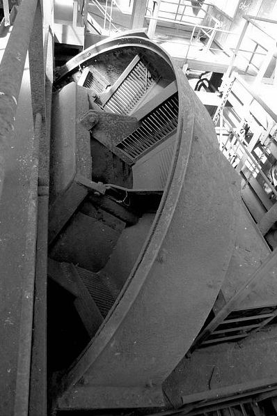 Drew Boy au Lavoir des Chavannes